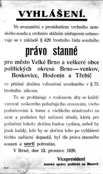 Vyhlášení stanného práva v prosinci roku 1920